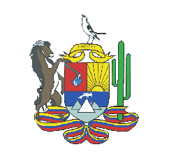 Escudo del municipio Falcón, estado Falcón, Venezuela